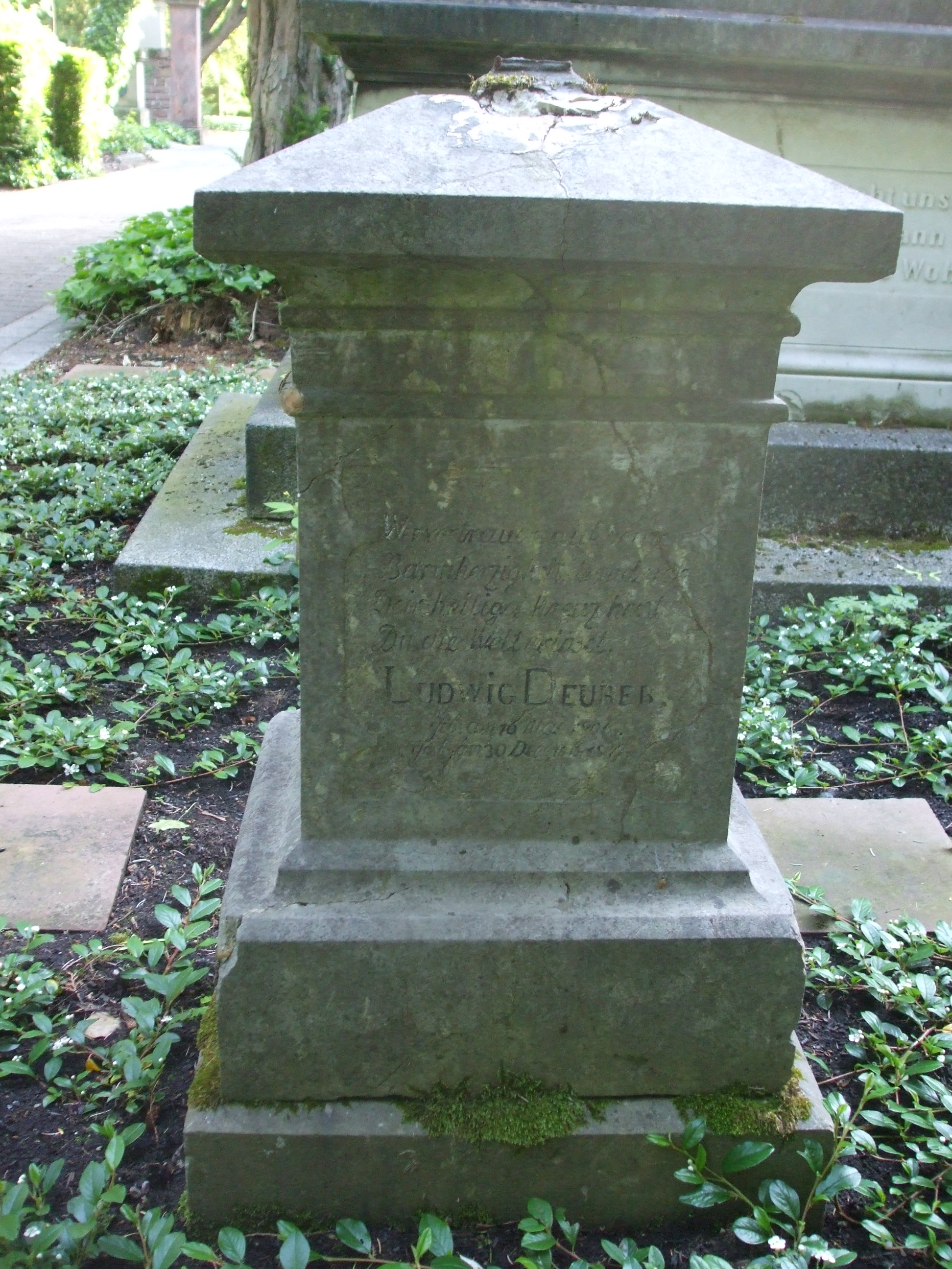 Grabstein von Ludwig Deurer (1806-1847), Sohn von Peter Ferdinand Deurer (1777-1844) und dessen Ehefrau Susette Fröhlich († 5. April 1836)